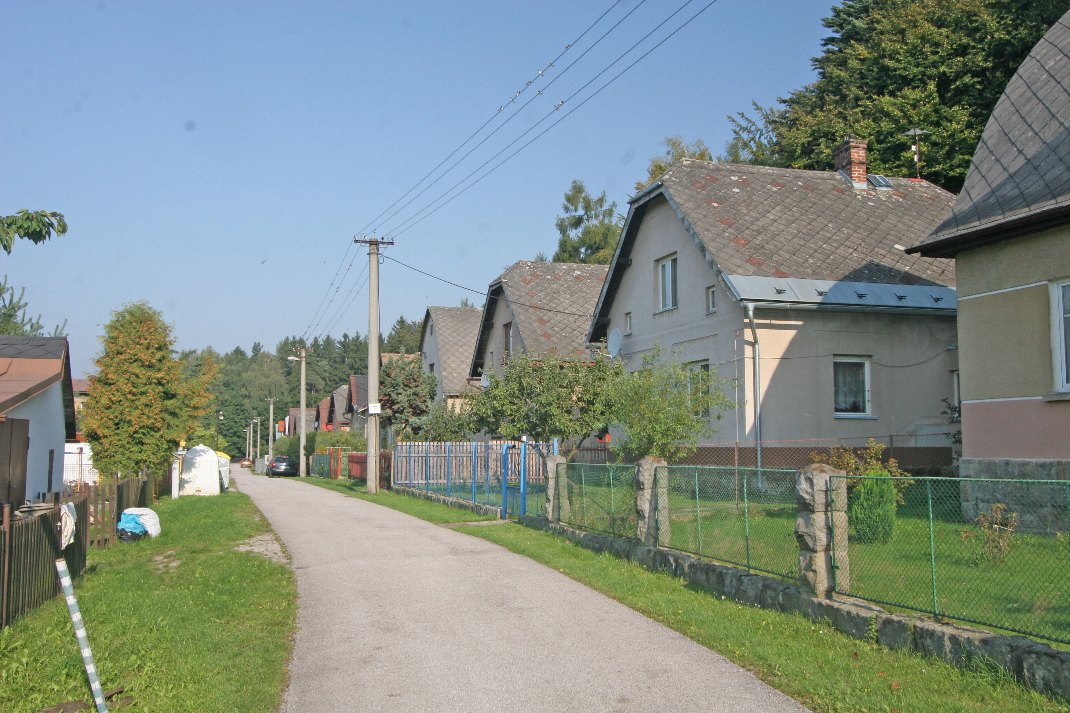 Nové Kocbeře čp. 39